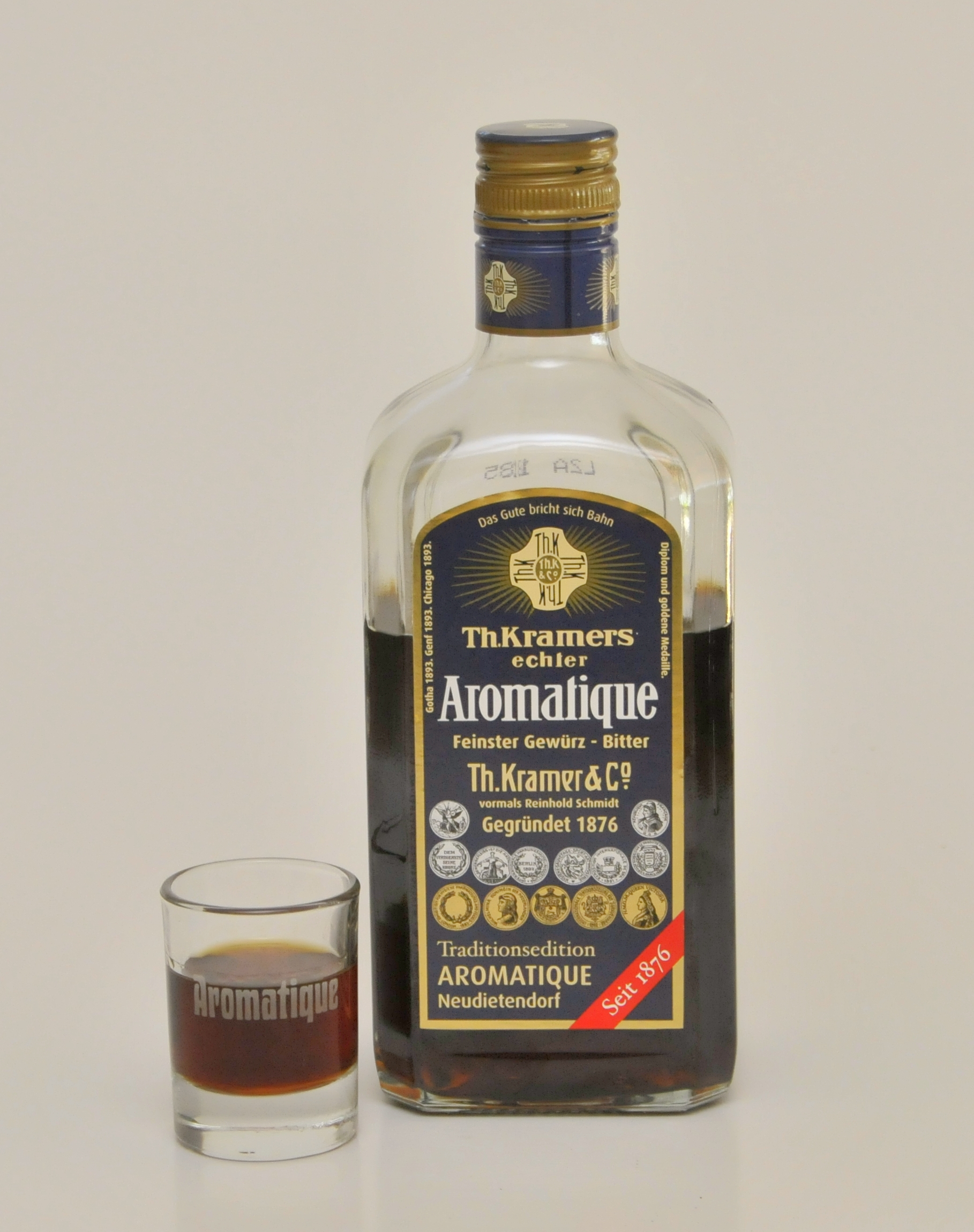 Aromatique-Flasche mit Glas